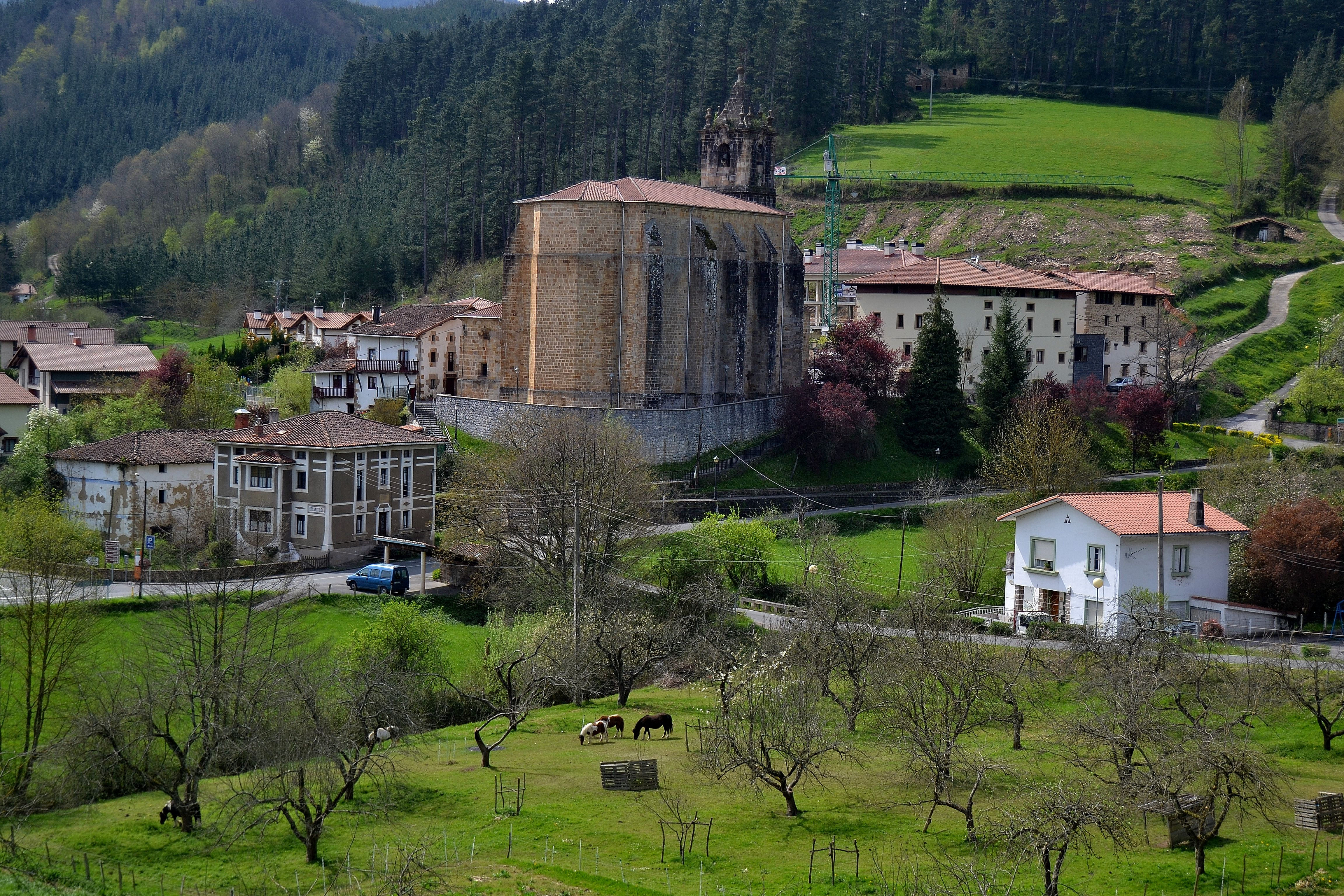 Mutiloako herrigunea. Gipuzkoa, Euskal Herria. The bourg of Mutiloa. Gipuzkoa, Basque Country.